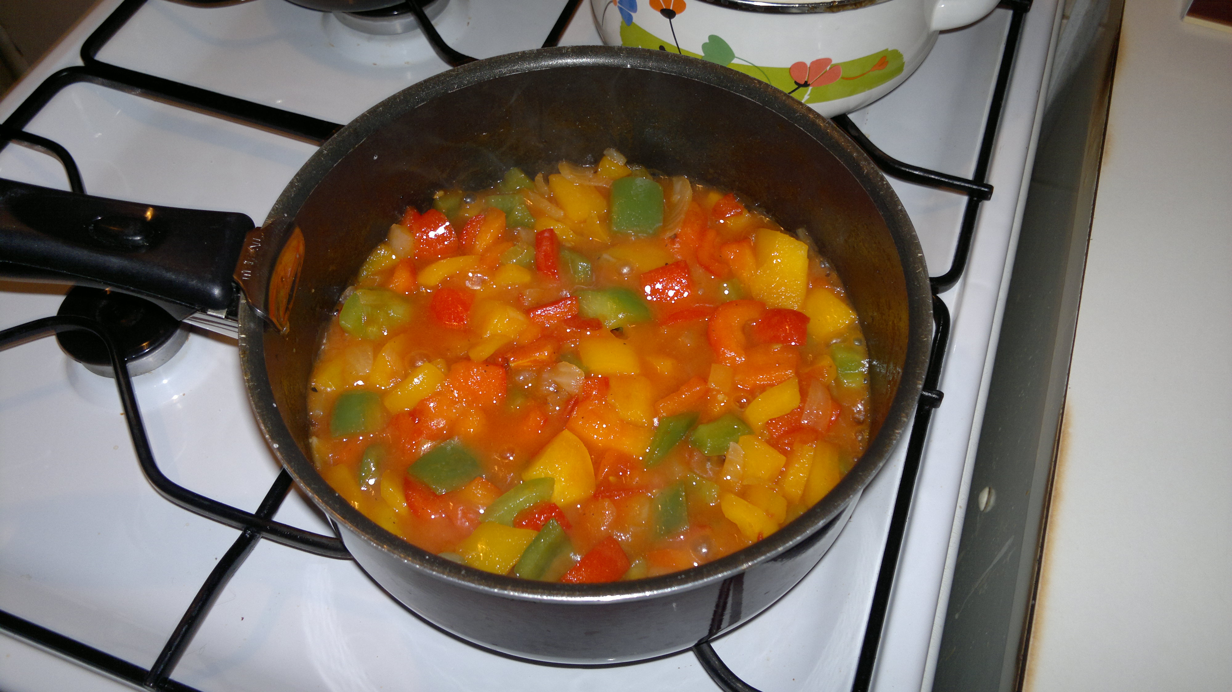 Lečo na plotně